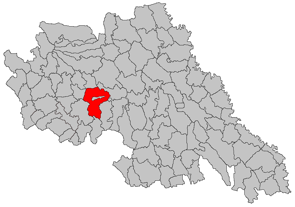 Categorie:Hărţi ale judeţului Iaşi